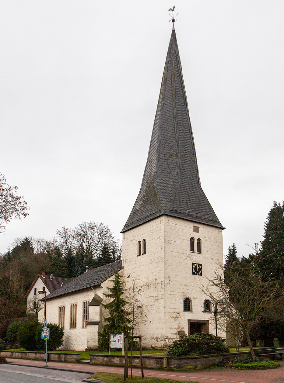 Ev. Pfarrkirche, Hausberge, Kiekenbrink 7 This is a photograph of an architectural monument.